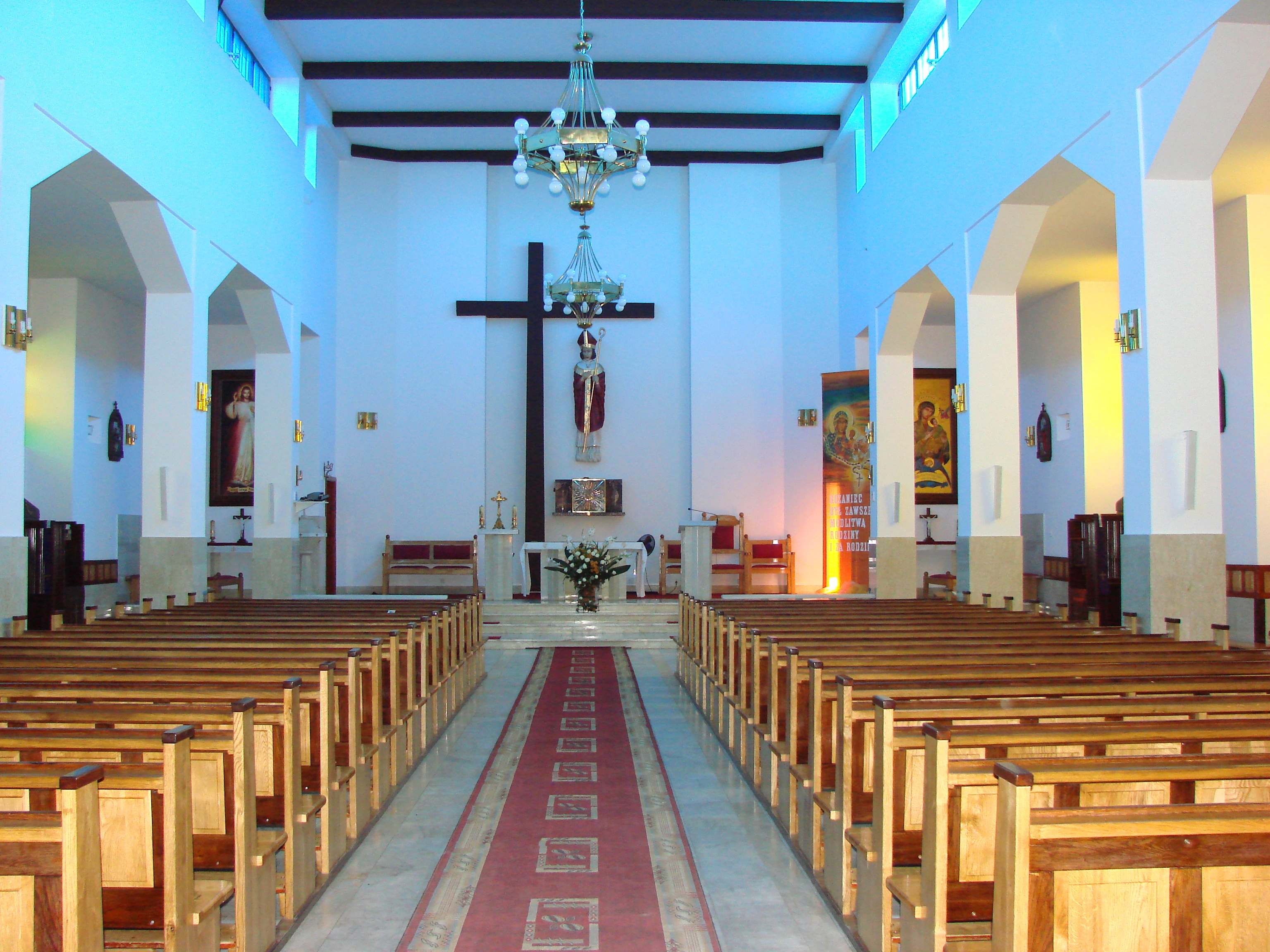 Wieluń - kościół p.w. św. Stanisława, biskupa